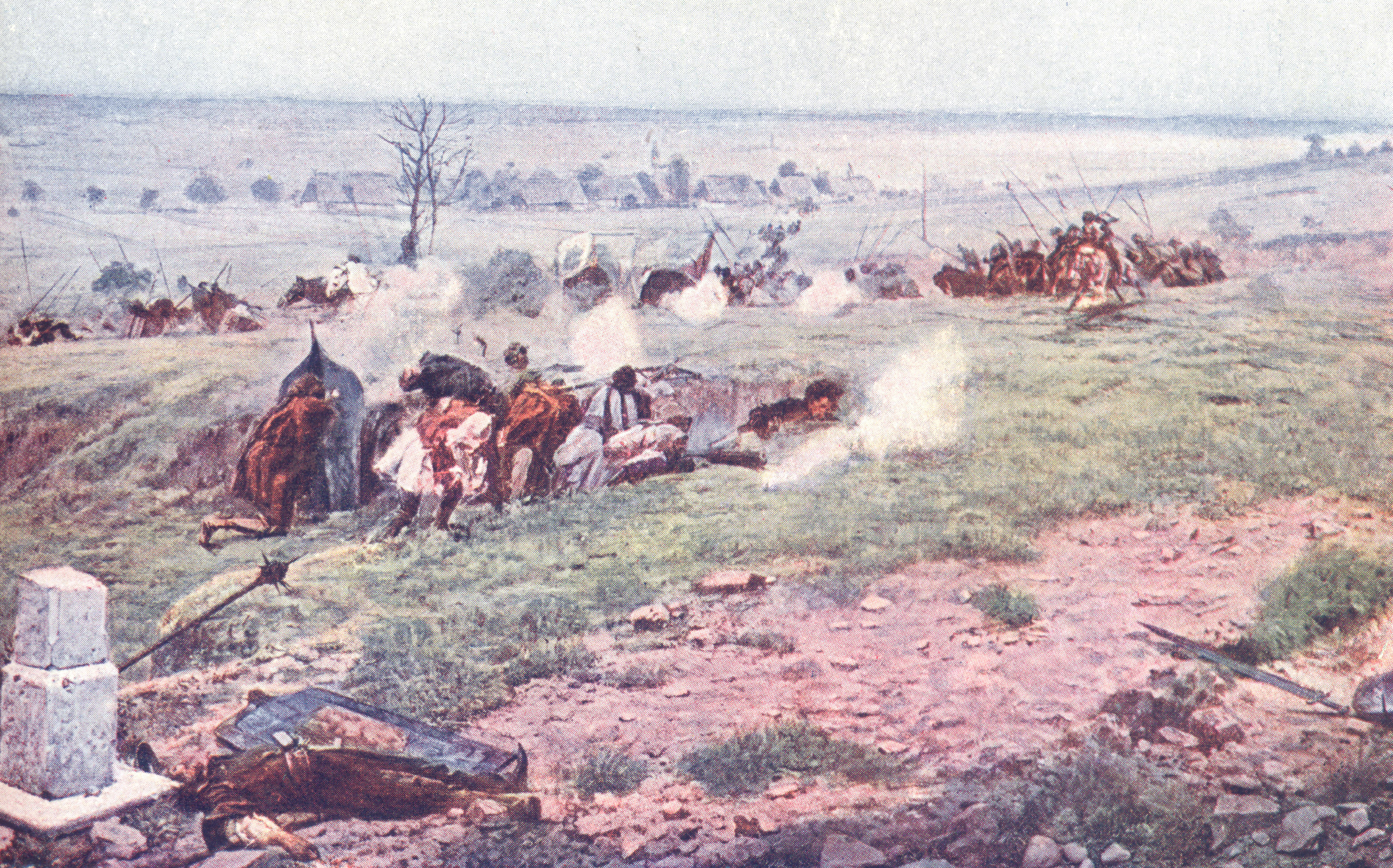 Bitva u Lipan: Skupinka pěchoty radikálů kryjící střelbou ustupující sirotčí a táborské vozy. Výjev z Maroldova panoramatu bitvy u Lipan, jež bylo pořízeno pro Výstavu architektury a inženýrství, která se konala na Výstavišti v Praze Holešovicích v roce 1898.